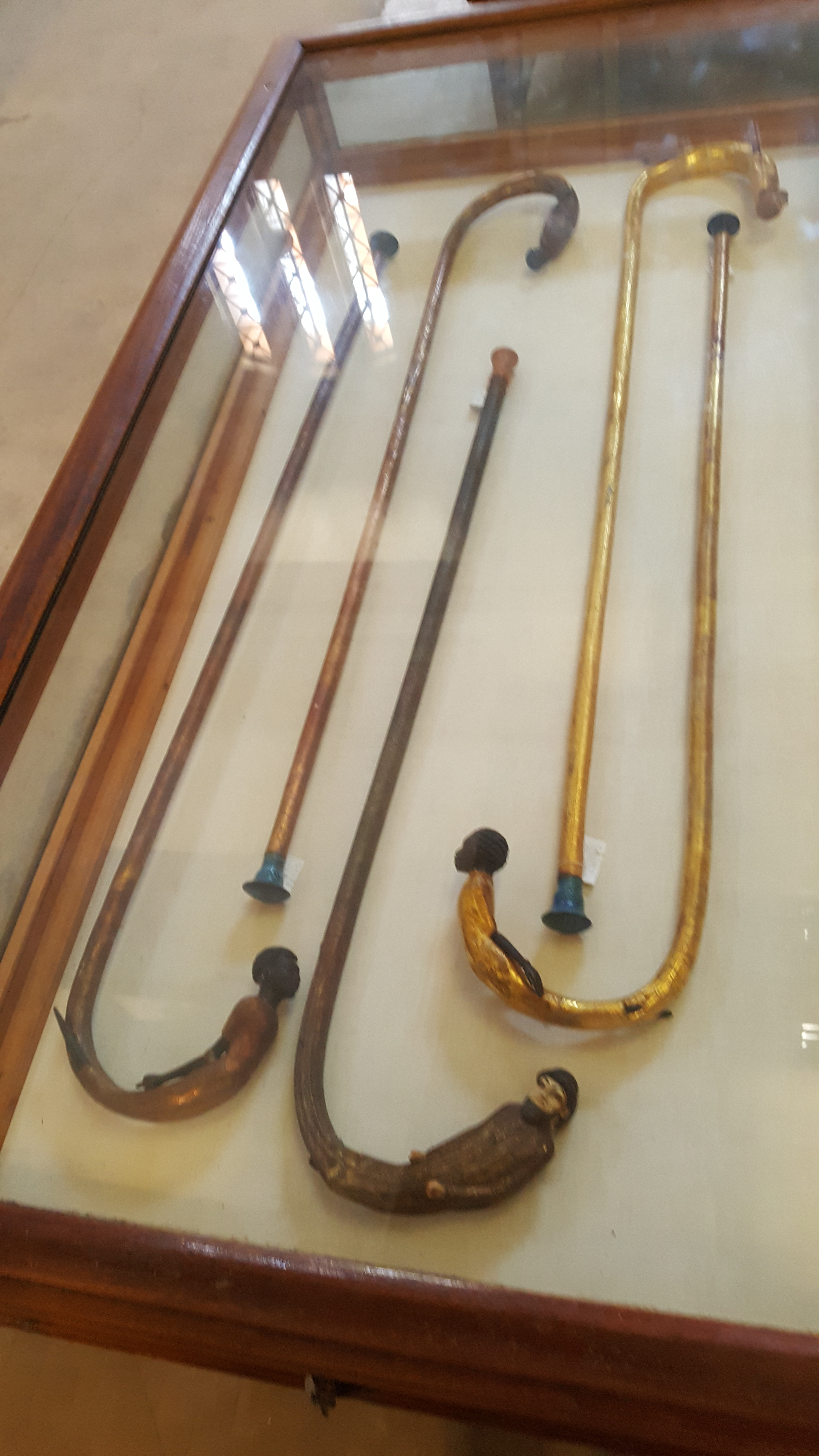 Egyptian Museum (Cairo)